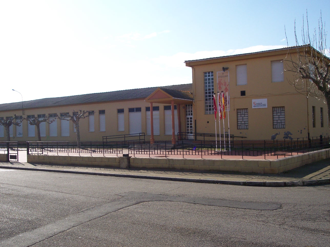 Vista del colegio de San Justo de la Vega